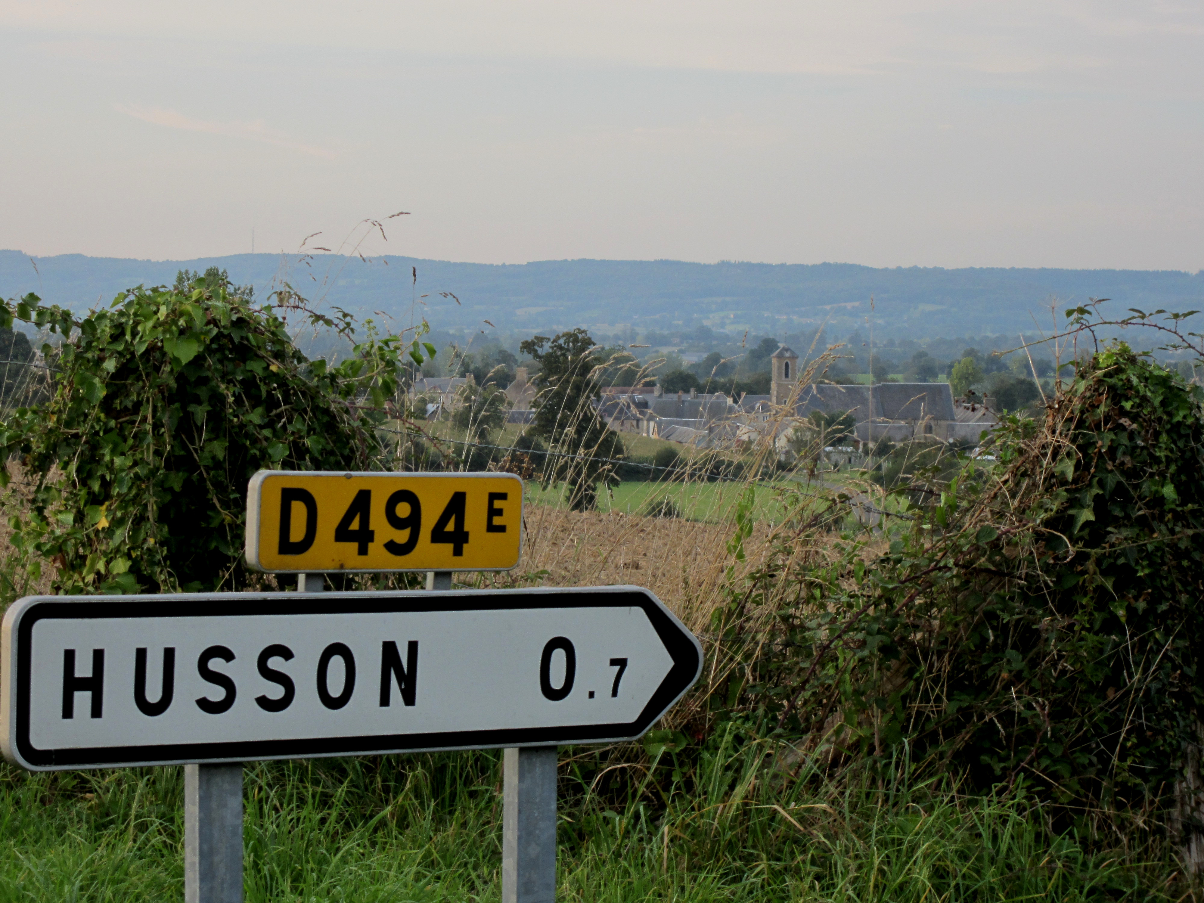 Husson, Manche